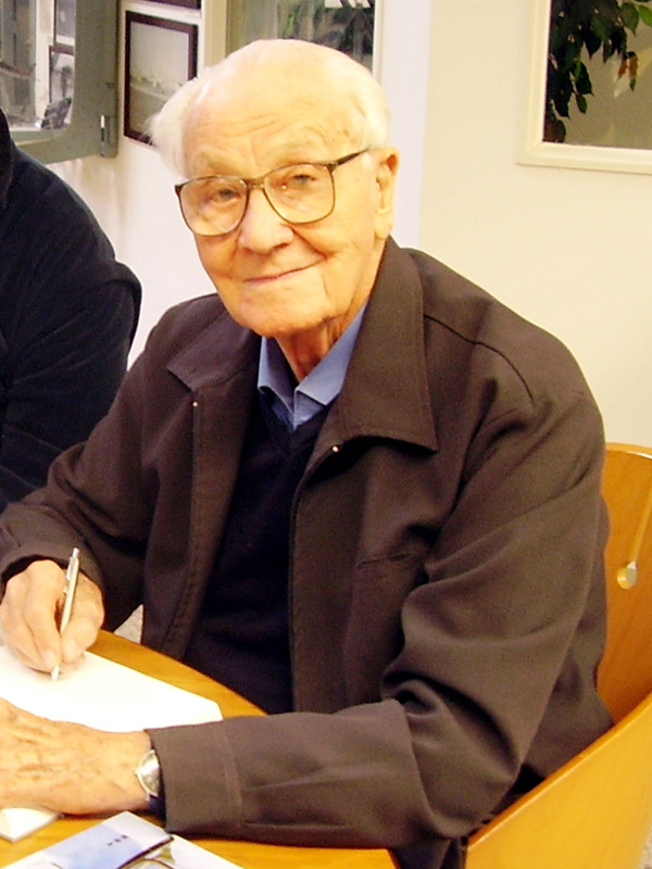 Martin Drewes am 13.10.2011 im Luftfahrtmuseum Hannover-Laatzen